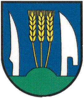 Oficiálny erb obce Kysak, okres Košice okolie.